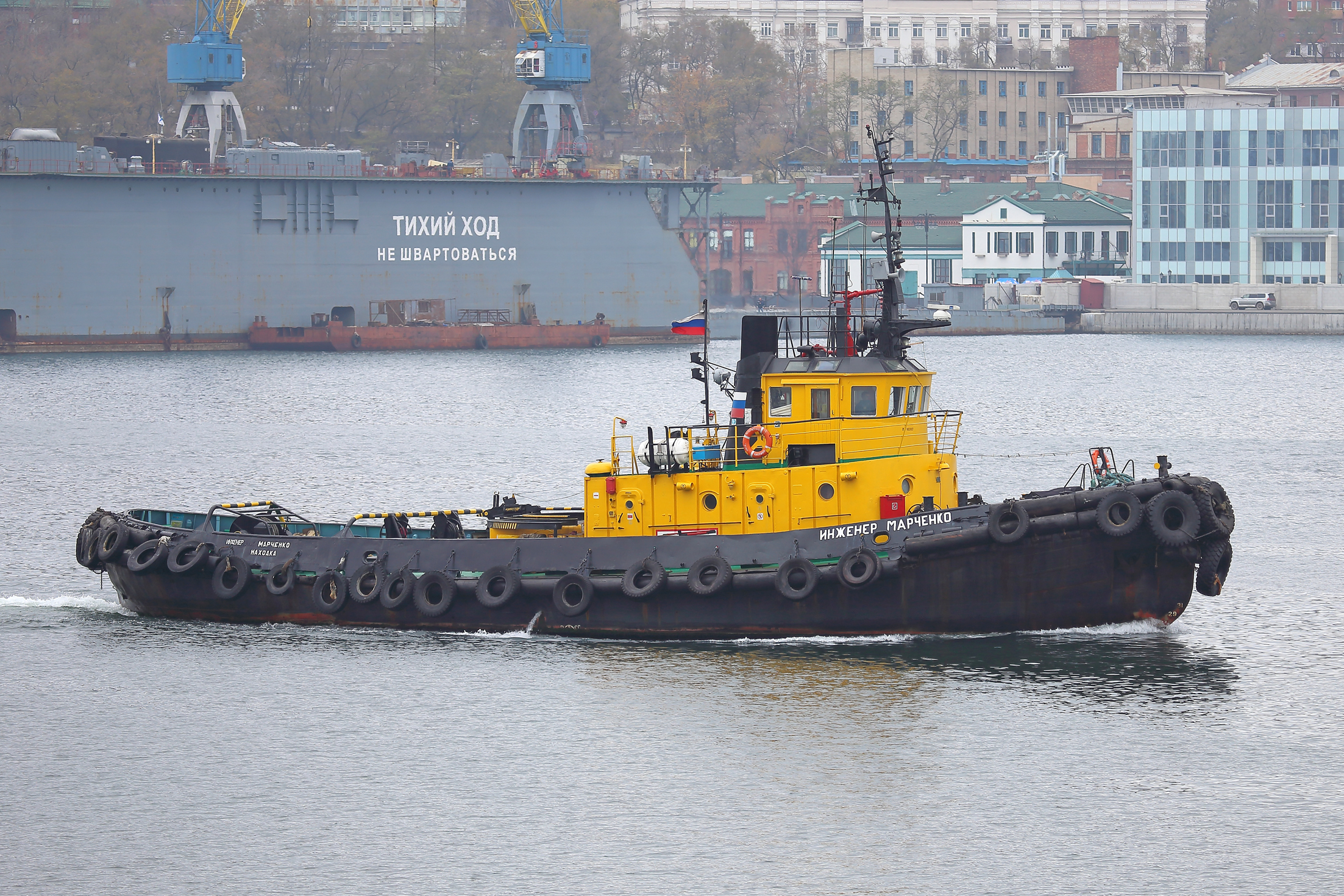 Буксир Инженер Марченко в Золотом Роге